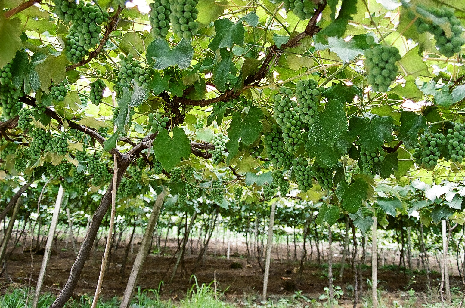 Vale dos Vinhedos - Rio Grande do Sul - Brasil